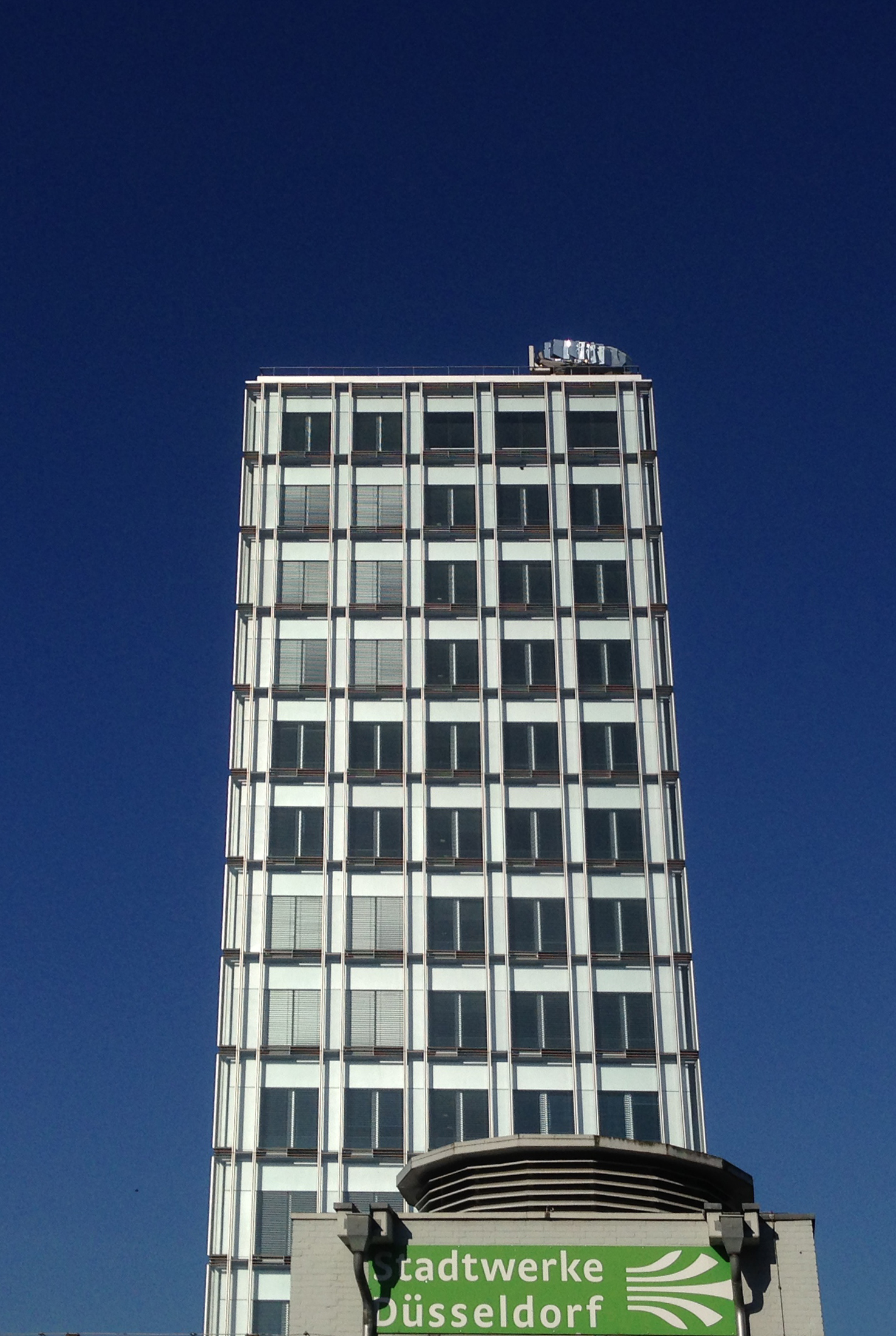 NRW.Bank mit „Crystal Rock“ von Ayşe Erkmen, Düsseldorf, Sicht von Reichsstraße